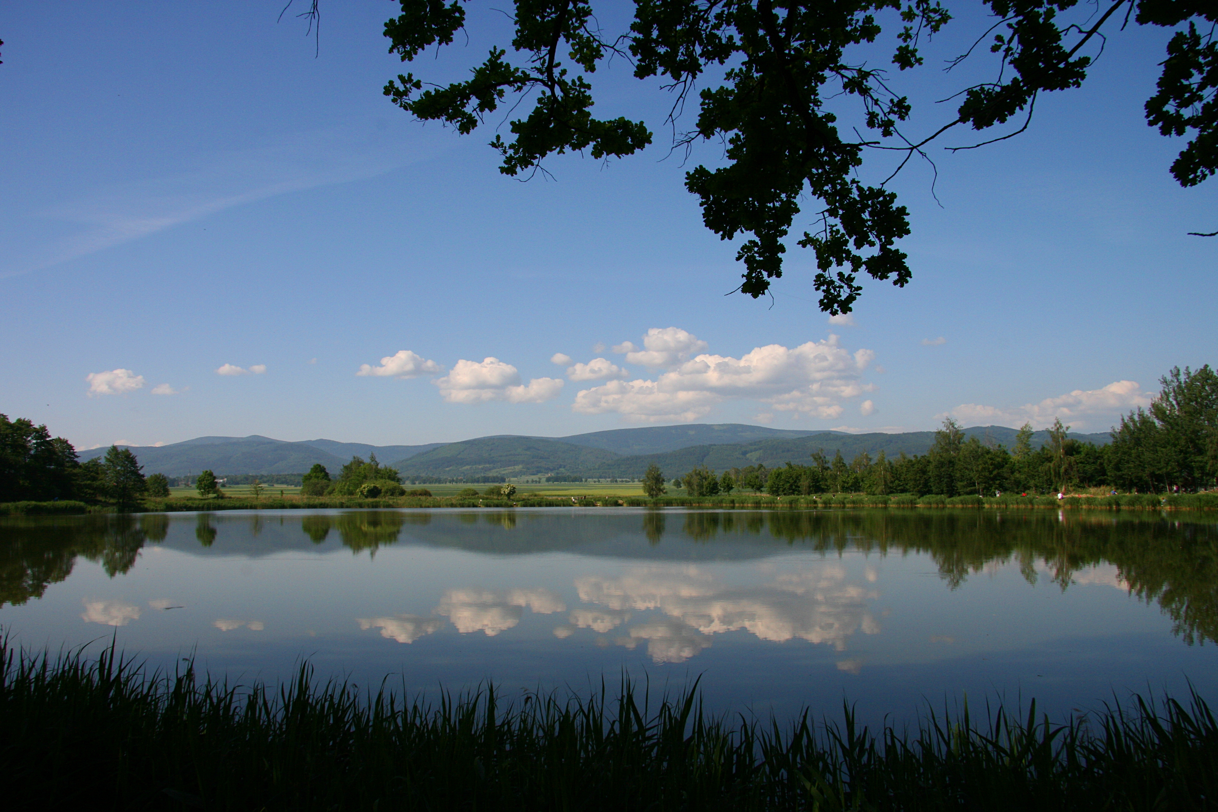 Staw w Bratoszowie z widokiem na Wielką Sowę